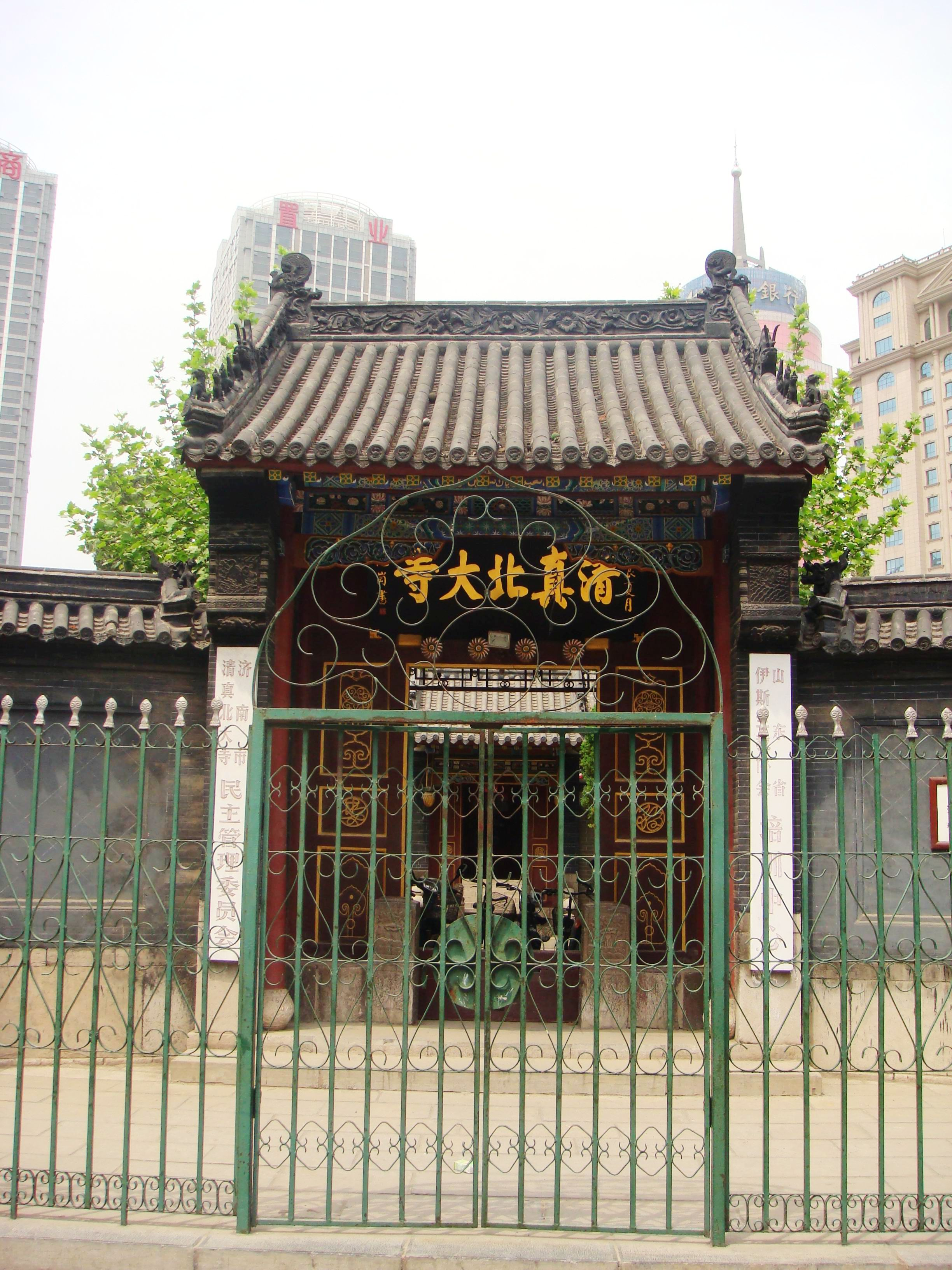 济南清真北大寺正门。